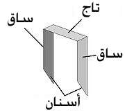 a diagram of a common staple الرسم البياني لدبوس الدباسة الشائع